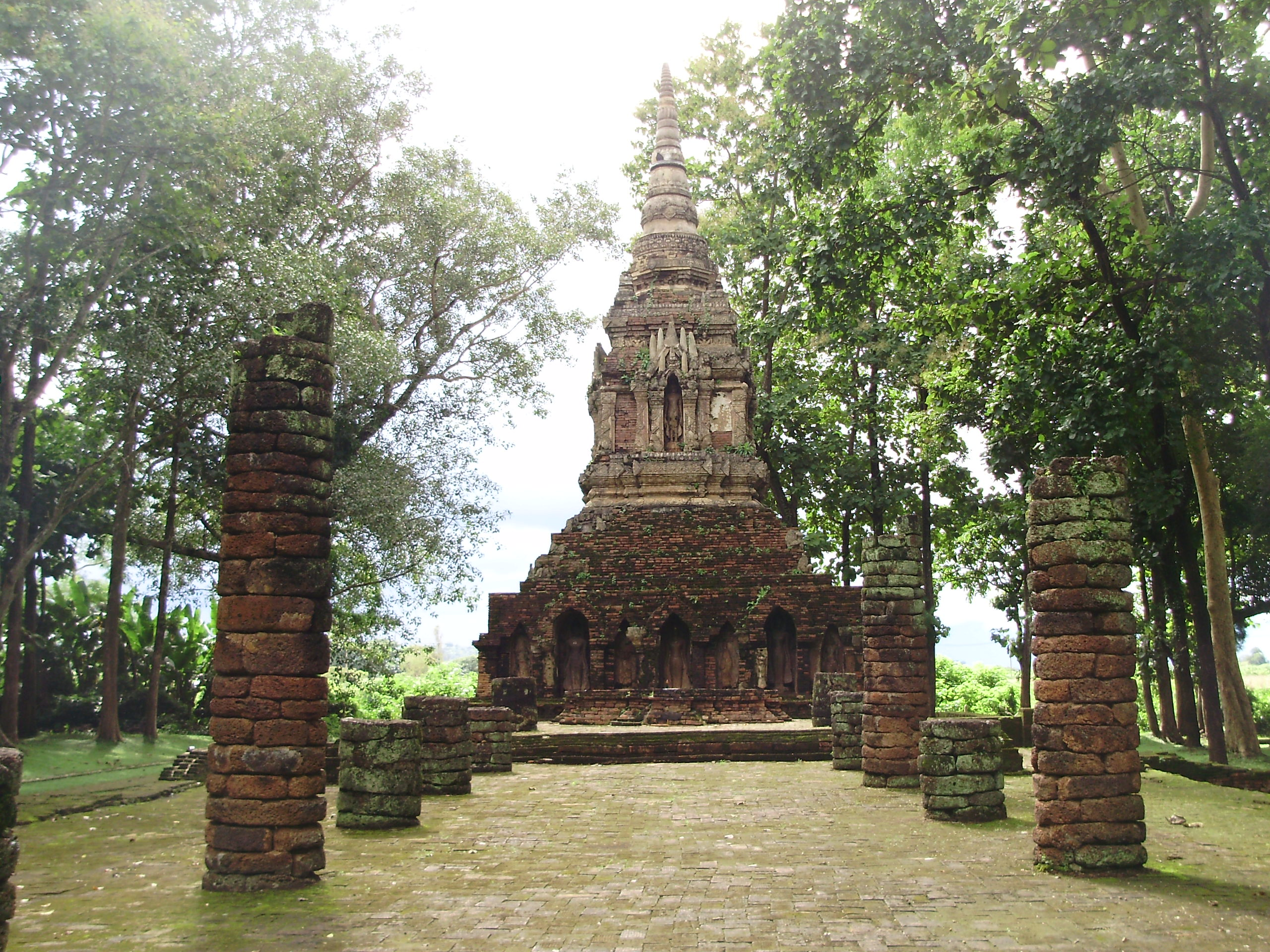 วัดป่าสัก ต.เวียง อ.เชียงแสน จ.เชียงราย